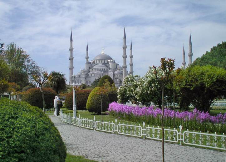 Modrá mešita Poridil xmort v roce 2002